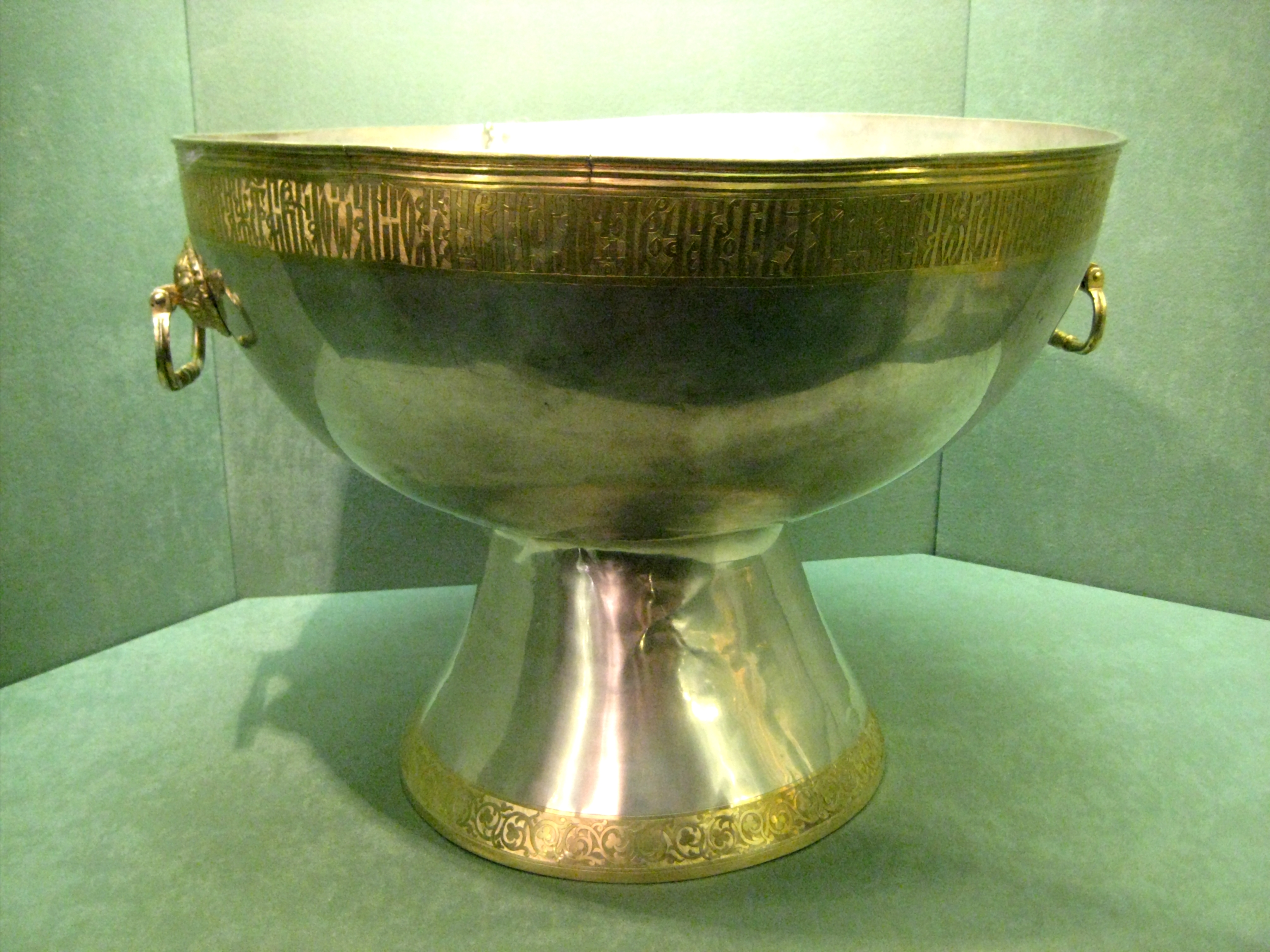 Чаша водосвятная. Москва, 1636. Серебро, литье, гравировка, ковка, золочение. На венце надпись: "...сия чаша зделана бысть... церковныя ради потребы на освещение воде повелением князя Ивана Шуйского...". Вклад Ив. Ив. Шуйского (ок. 1566-ок.1638), младшего брата царя Василия.